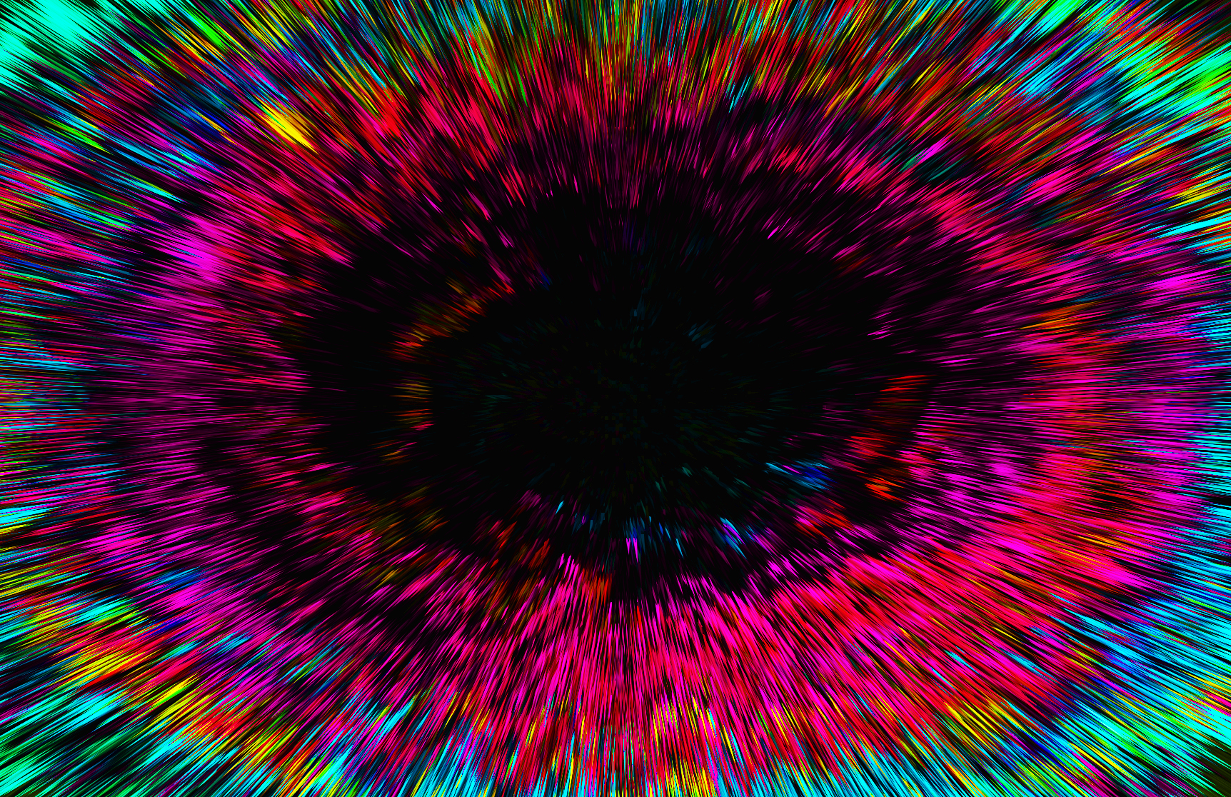 Nitrous Oxide on LSD